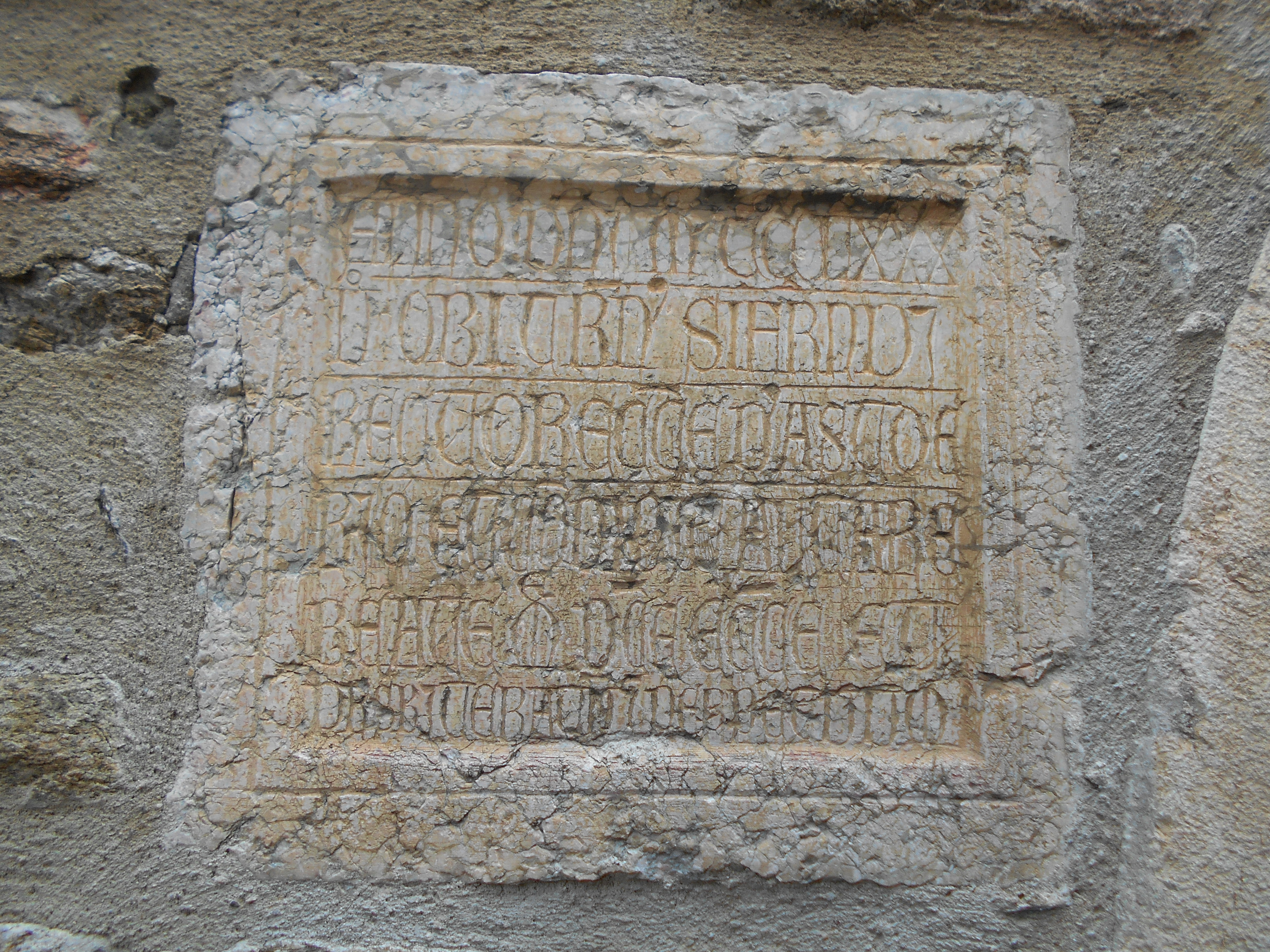 Làpida gòtica a Sant Esteve d'Estoer